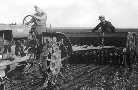 Трактористка колхоза имени 12-й годовщины Октября В.Костренко за посевом специальных растений на приманочной полосе для сельскохозяйственных вредителей.